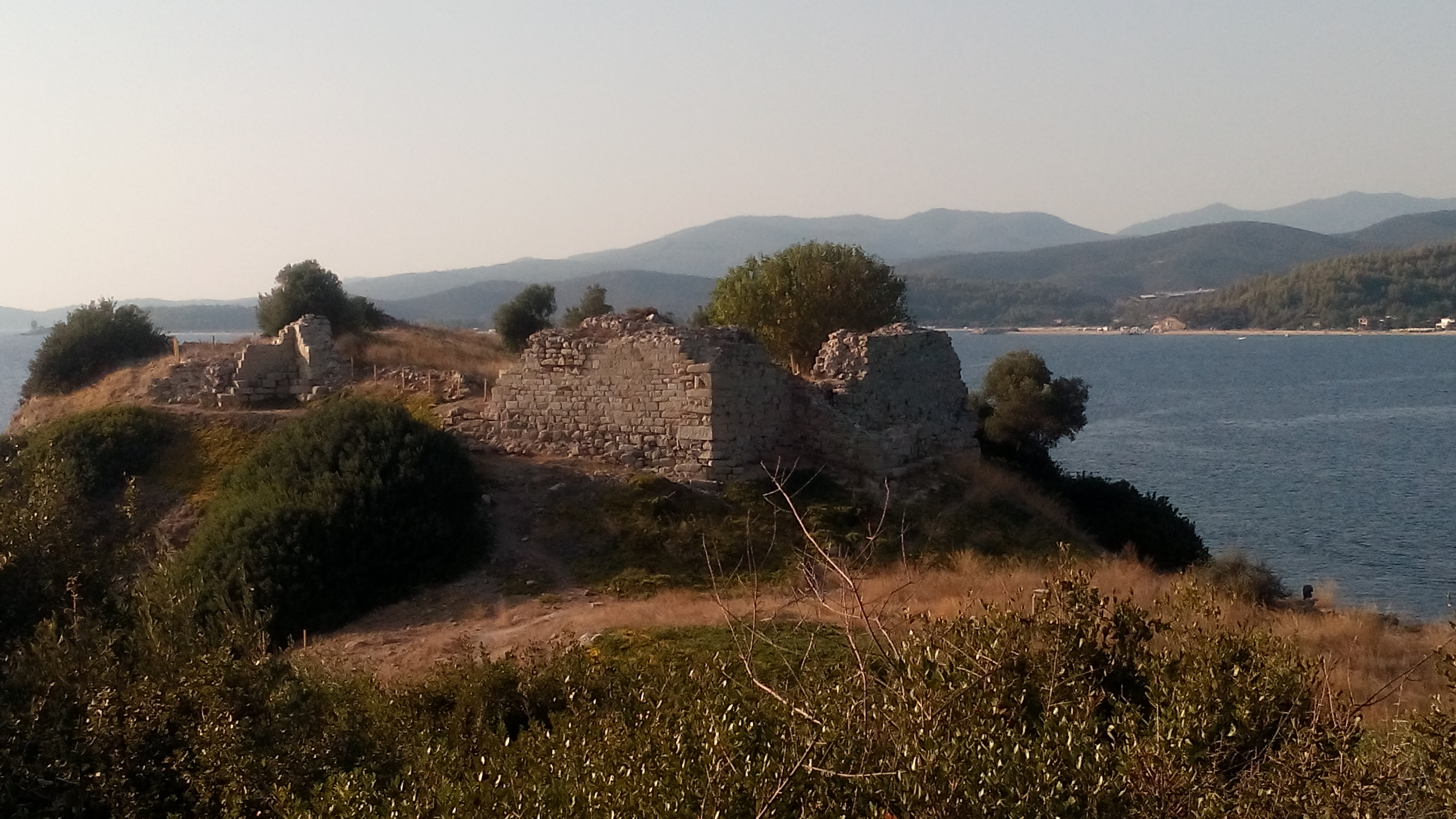 «Ναός Αγίου Αθανασίου Συκιάς»